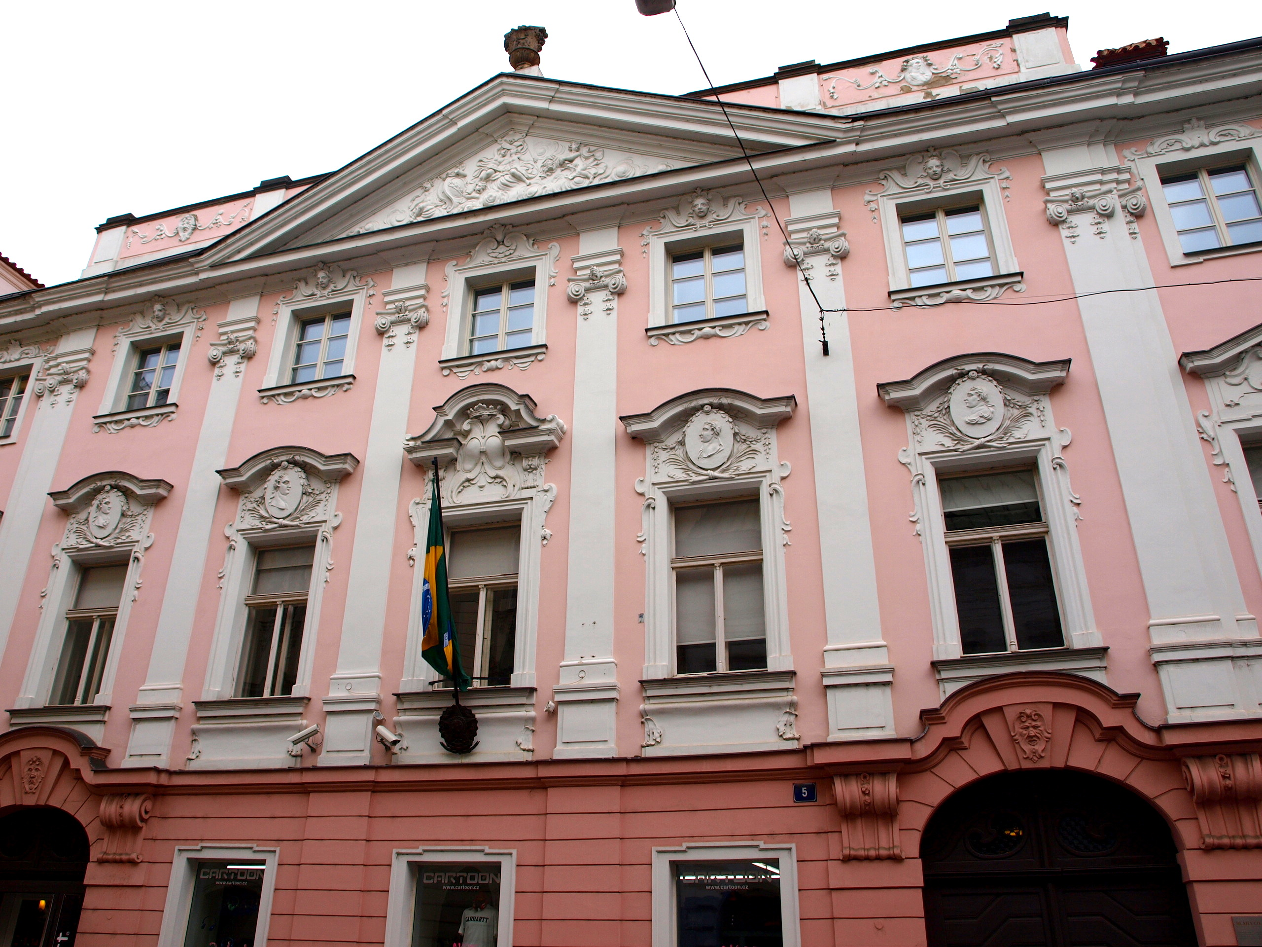 Neubergovský palác - Panská